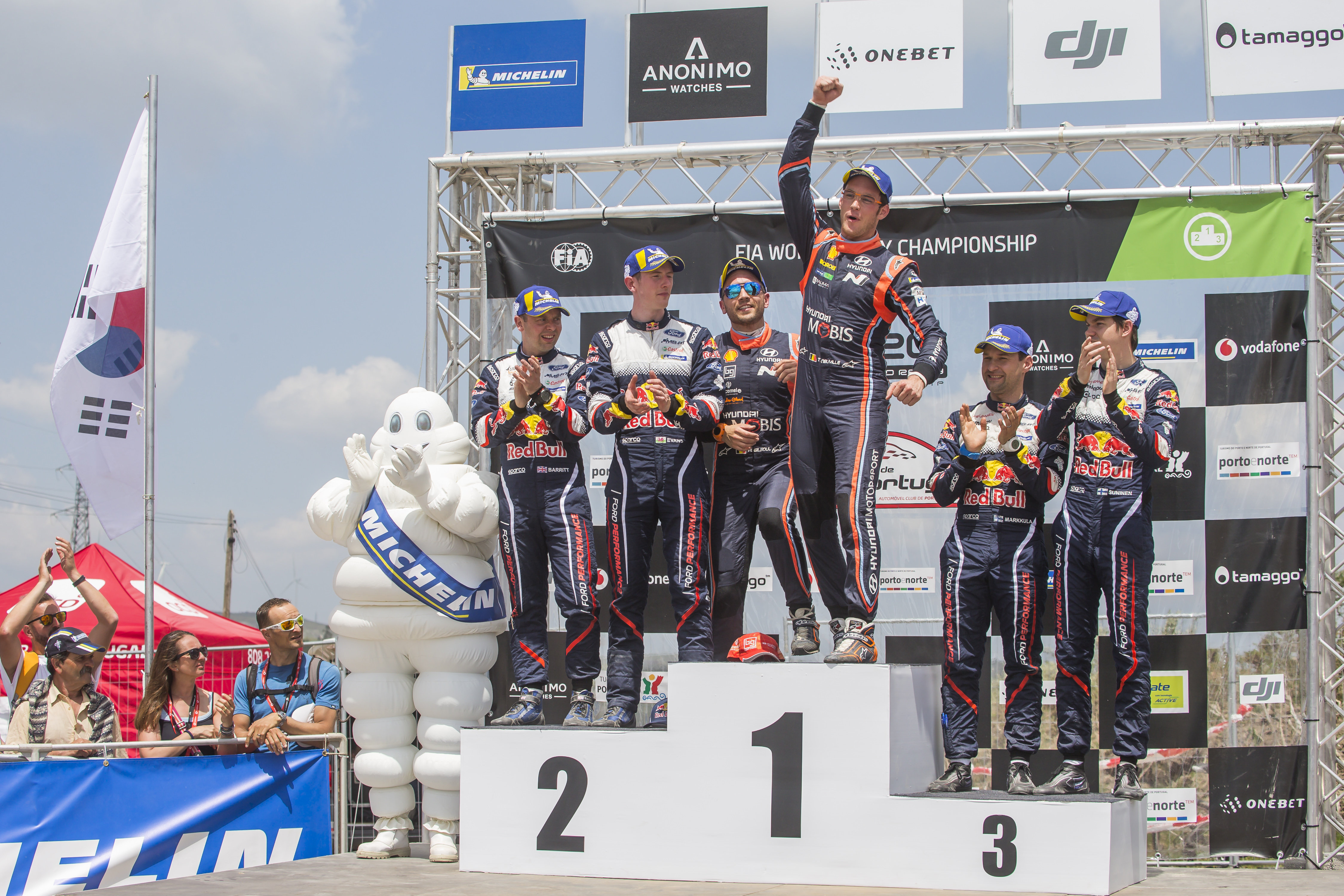 Podium podczas Rajdu Portugalii 2018